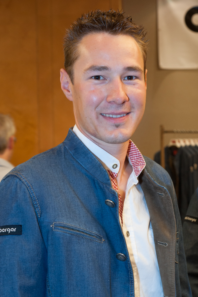 Einkleidung der Österreichischen Teilnehmer an den Olympischen Sommerspielen 2016 am 16./17. Juli 2016 in Wien. Bild zeigt Sebastian Kuntschik.